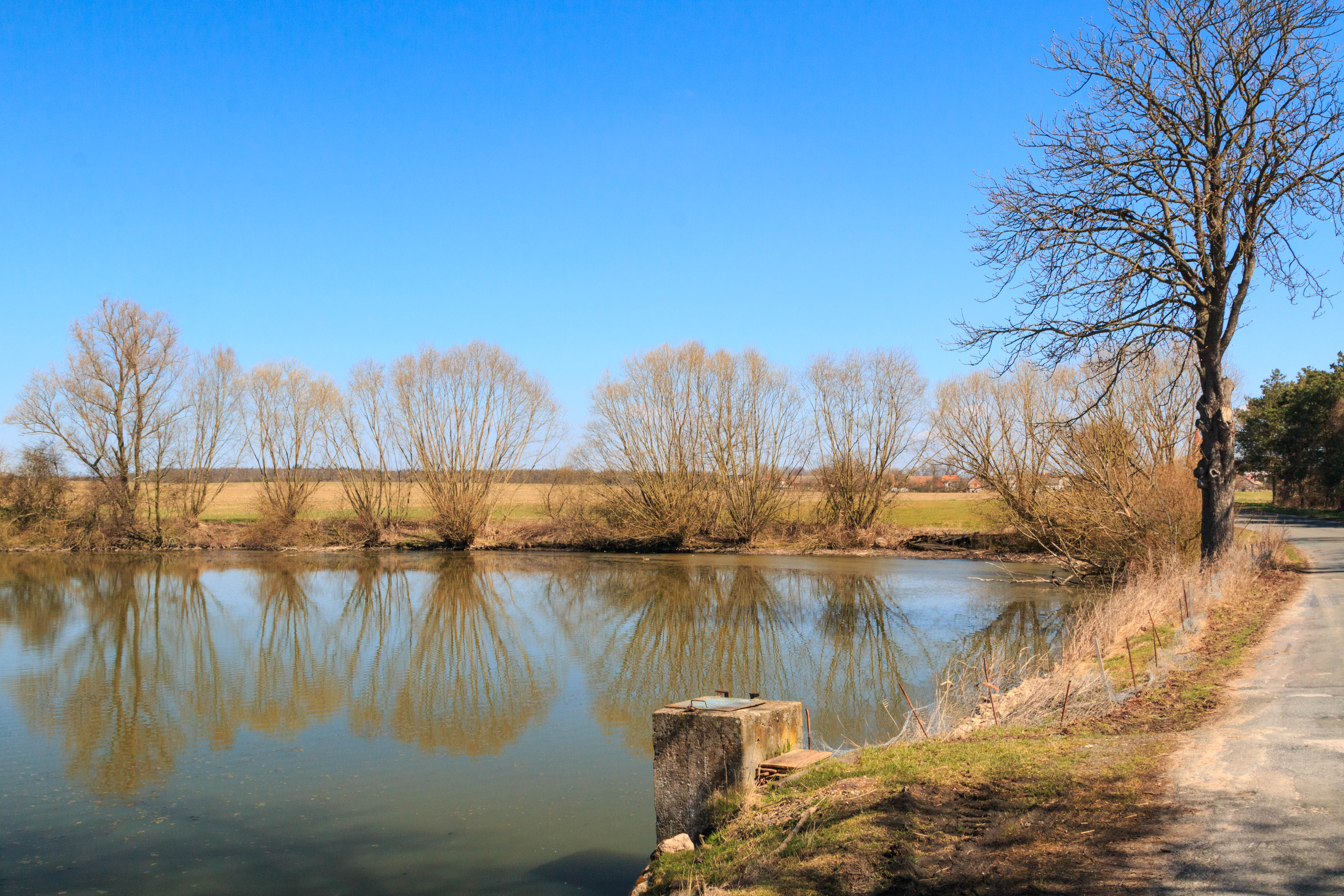 rybník Svinče u obce Kosičky v okrese Hradec Králové Project: Vodstvo.